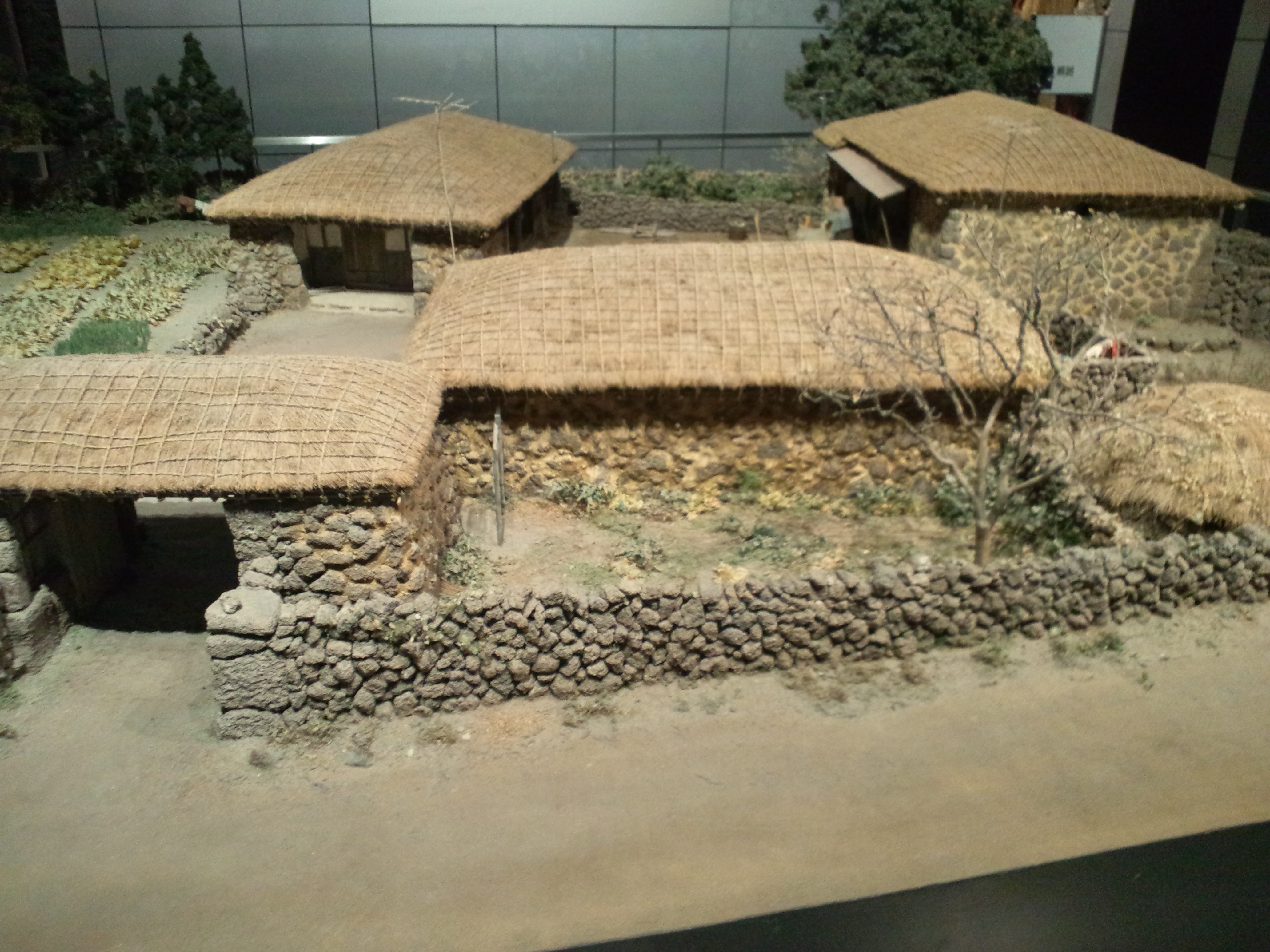 国立民族学博物館（大阪） 済州島の民家の模型（縮尺1/10・韓国）